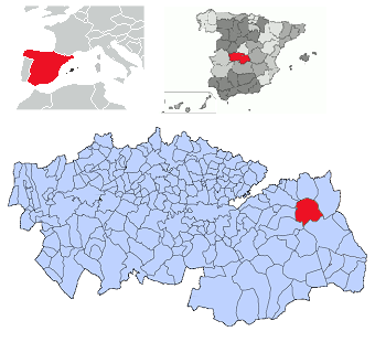 Villatobas en la provincia de Toledo